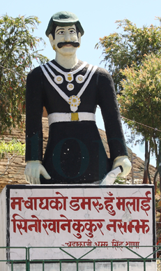 Amaragadhi killa in Dadeldhura Nepal .